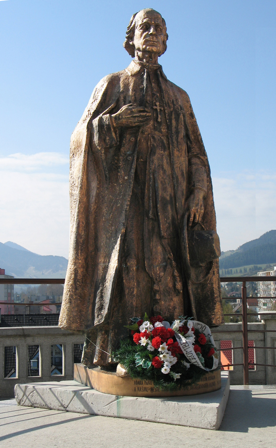 Autorom bronzovej plastiky Andreja Hlinku v Ružomberku je sochár Ladislav Berák